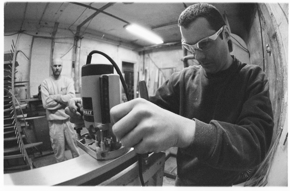 Daniel Serre et Denis Rey à la réalisation des prototypes de skis. Manufacture Aluflex, 2004